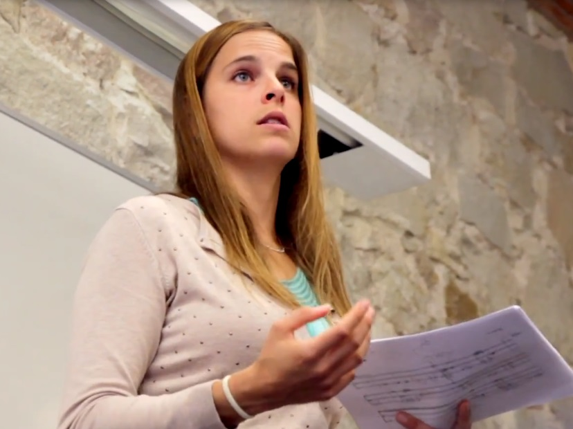 Cicle 150 anys Das Kapital - La fórmula trinitaria: interés, renta del suelo y salario